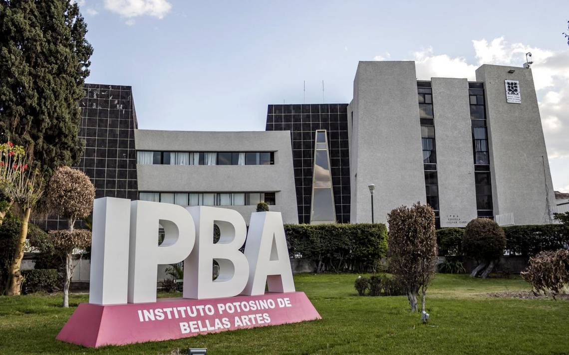 Instituto Potosino de Bellas Artes de San Luis Potosí, vista desde la Avenida Universidad